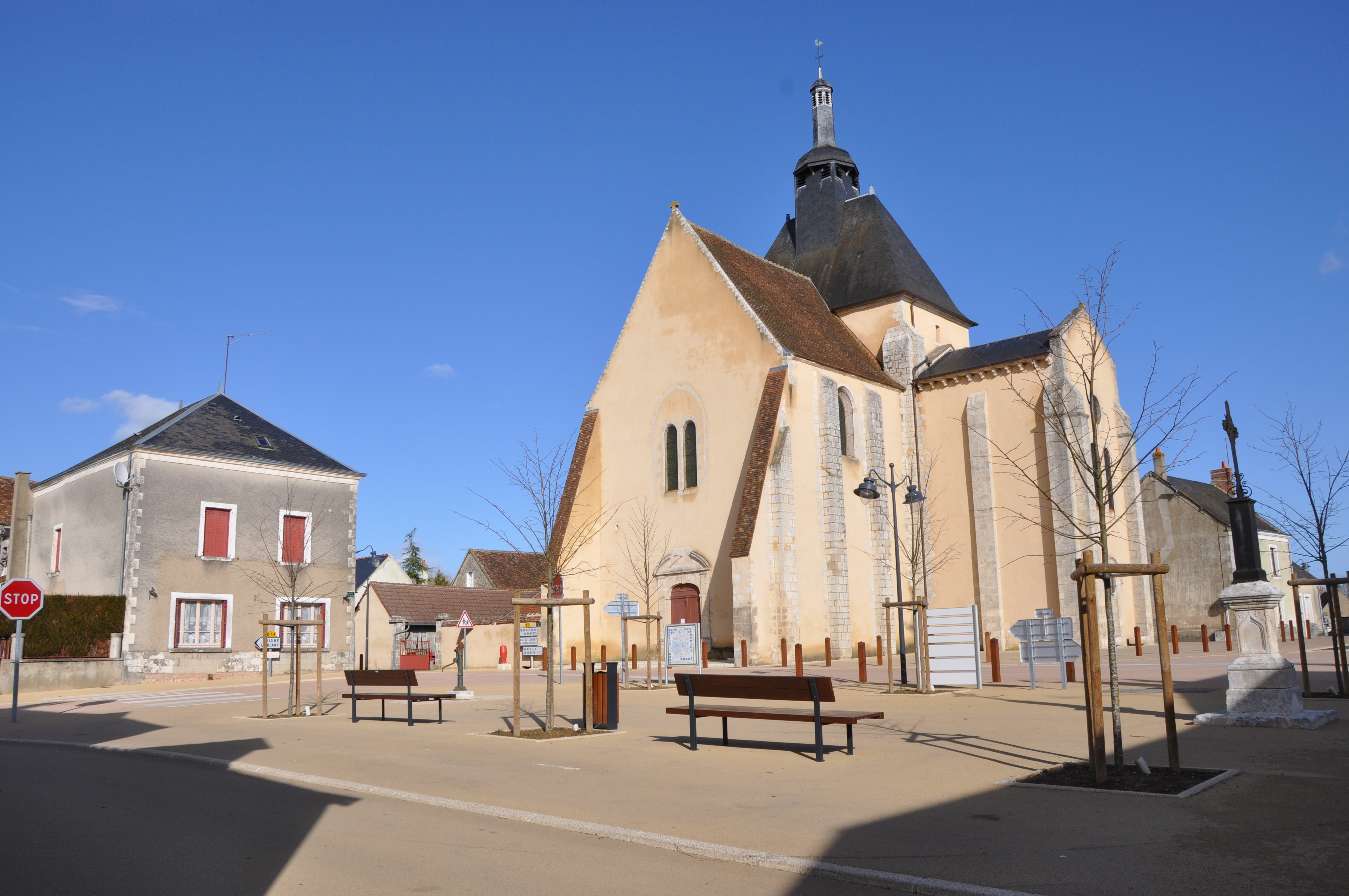 Place Principale de Méobecq (Indre)